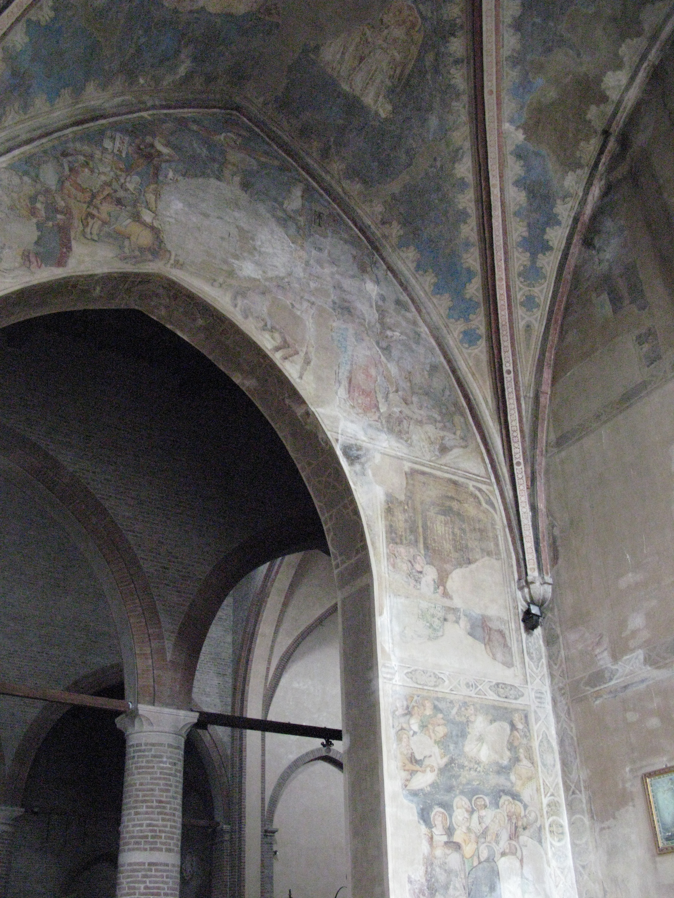 Mantova, chiesa di San Francesco: dettaglio dell'interno.